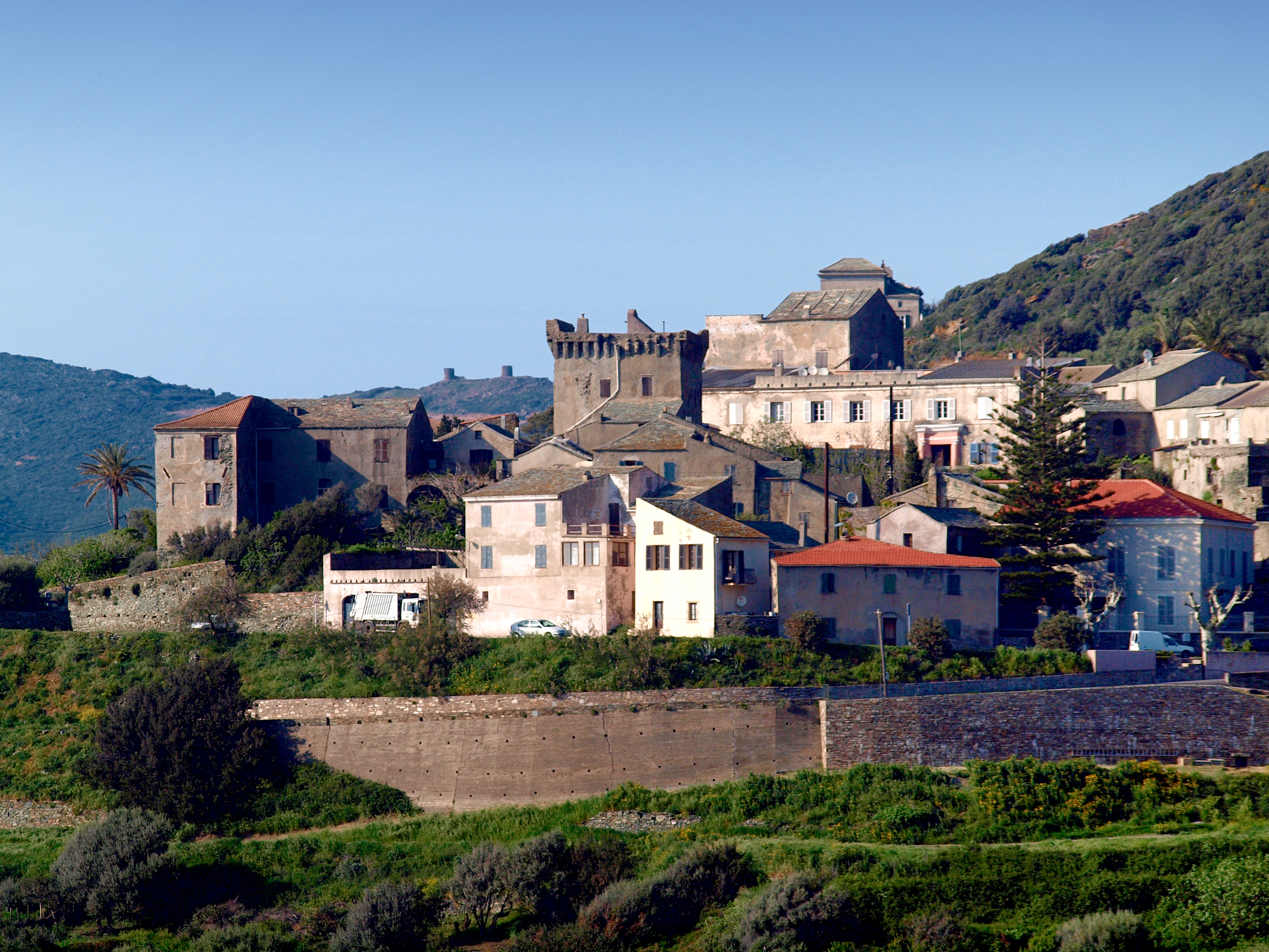 Morsiglia (Corsica) - Hameau de Stanti